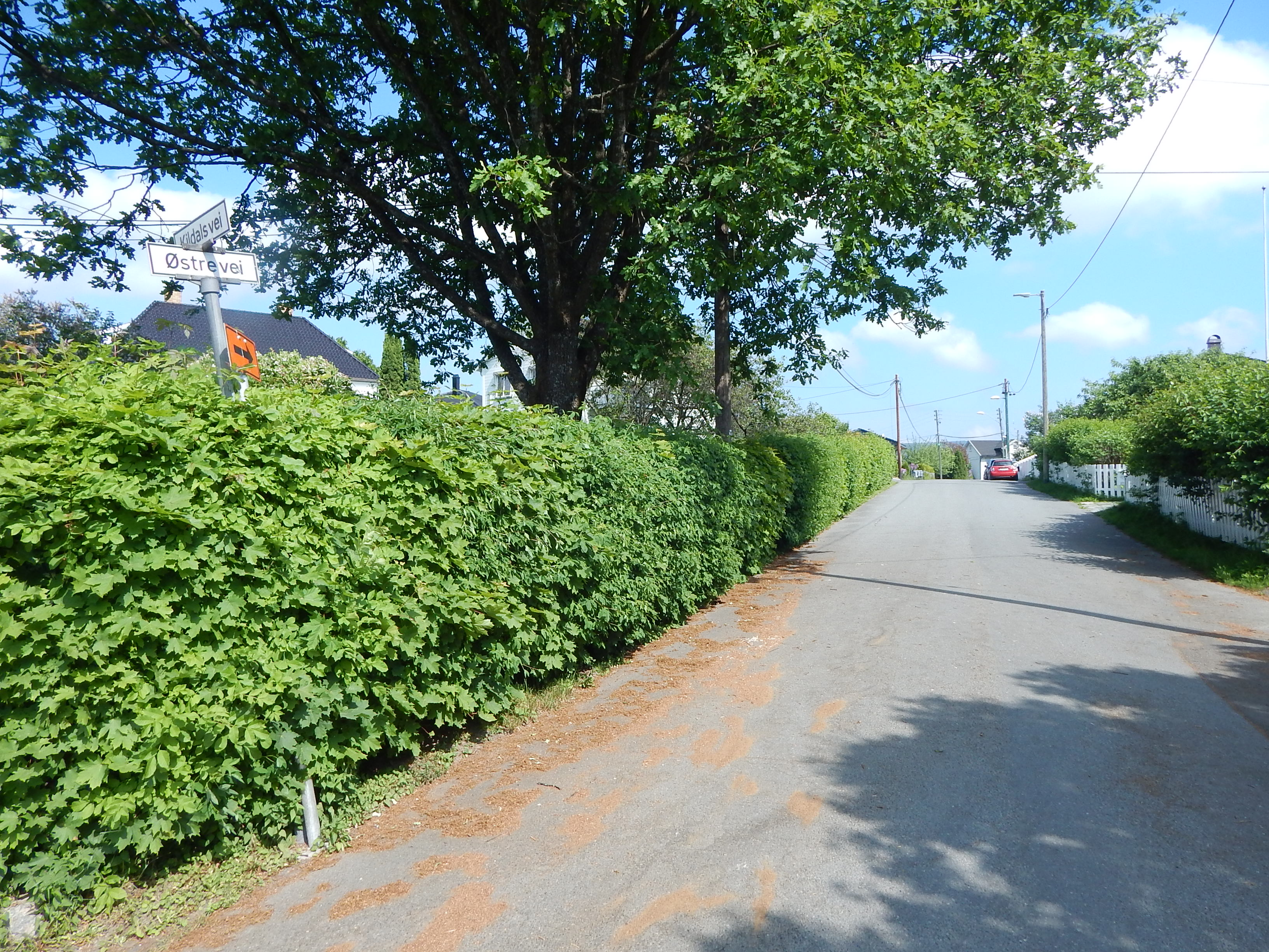 Østre vei sett fra Kildals vei